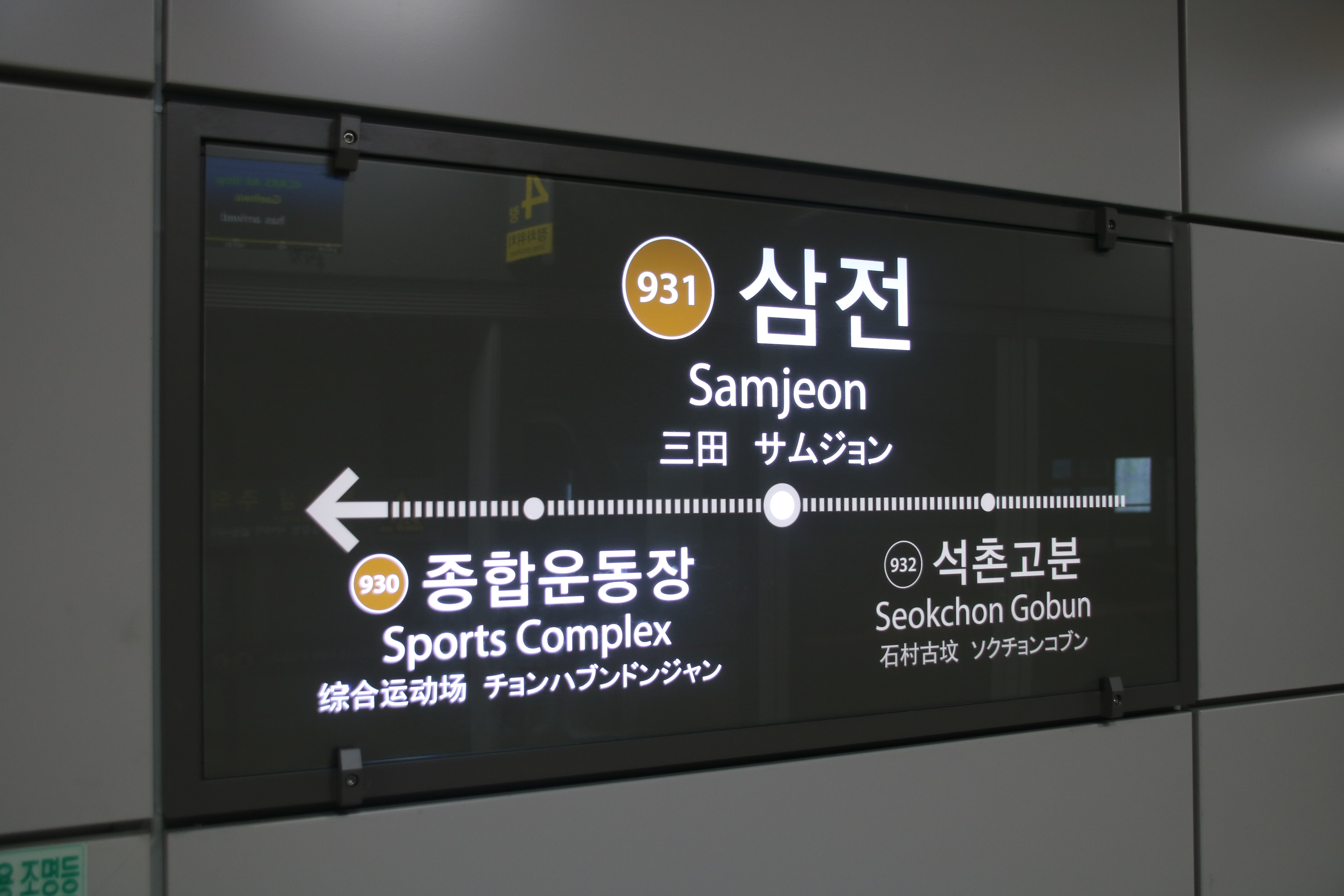 역명판(개화 방면)